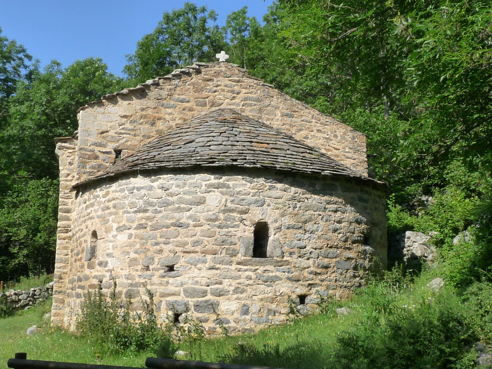 Chapelle St-Martin d'Envalls, Pyrénées-Orientales, France